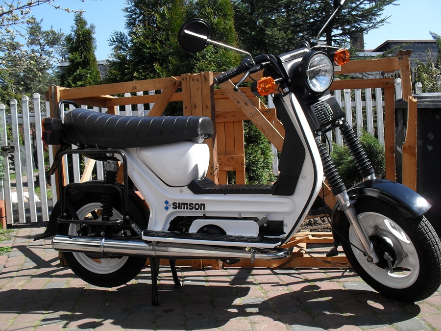 Zdjęcie przedstawiające fabrycznie nowy motorower Simson SR50/1 CE z 1990 roku będącego w posiadaniu prywatnego kolecjonera, Pana Marcina Księżyka. W tle widoczna skrzynia ładunkowa w której pojazd opuszczał fabrykę w drodze do klienta. Motorower był prezentowany w programie telewizyjnym "Legendy PRL-u".